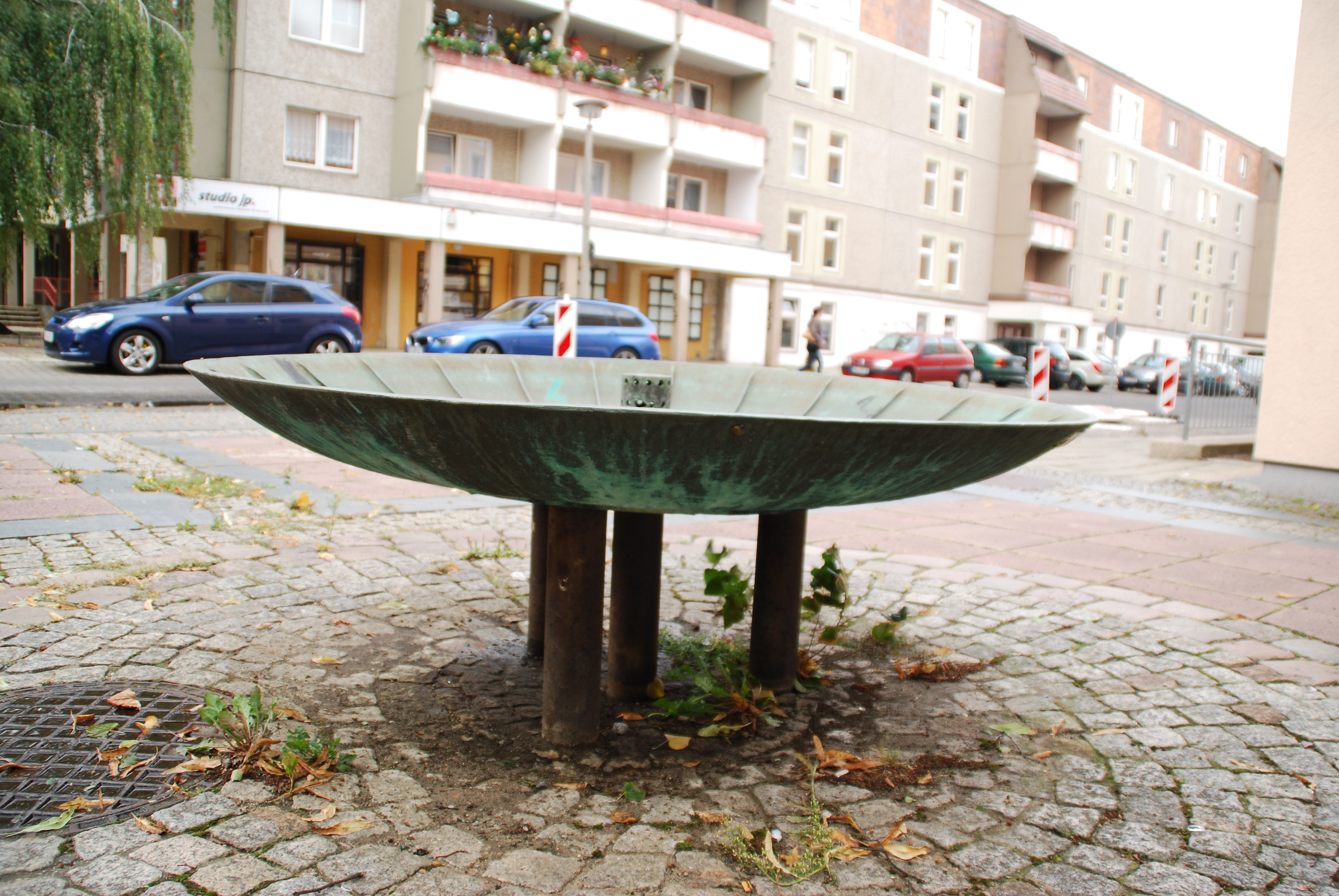 "Tröpfelbrunnen" in Frankfurt (Oder), Karl-Marx-Straße/Wollenweberstraße, Aufbauten demontiert Originalzustand mit Aufbauten